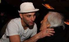 Jordi Barre et R Can by Daniel Castello